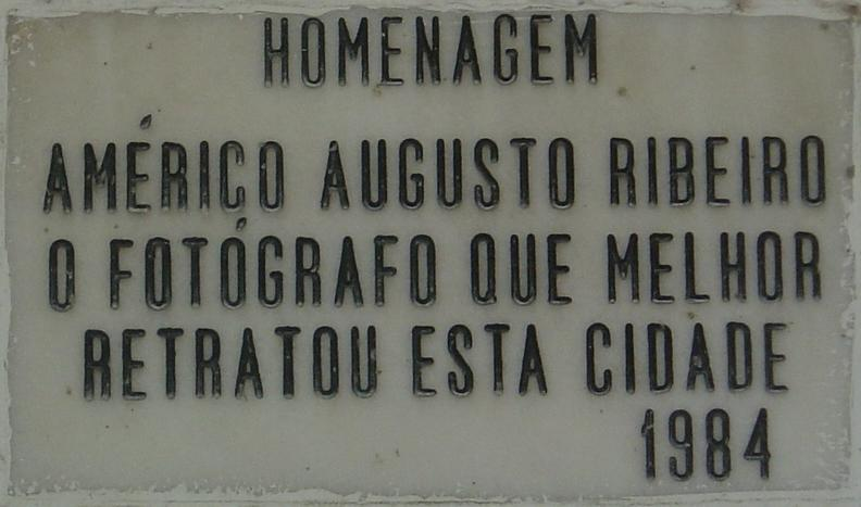 Placa comemorativa do papel desempenhado por Américo Ribeiro como fotógrafo da cidade de Setúbal